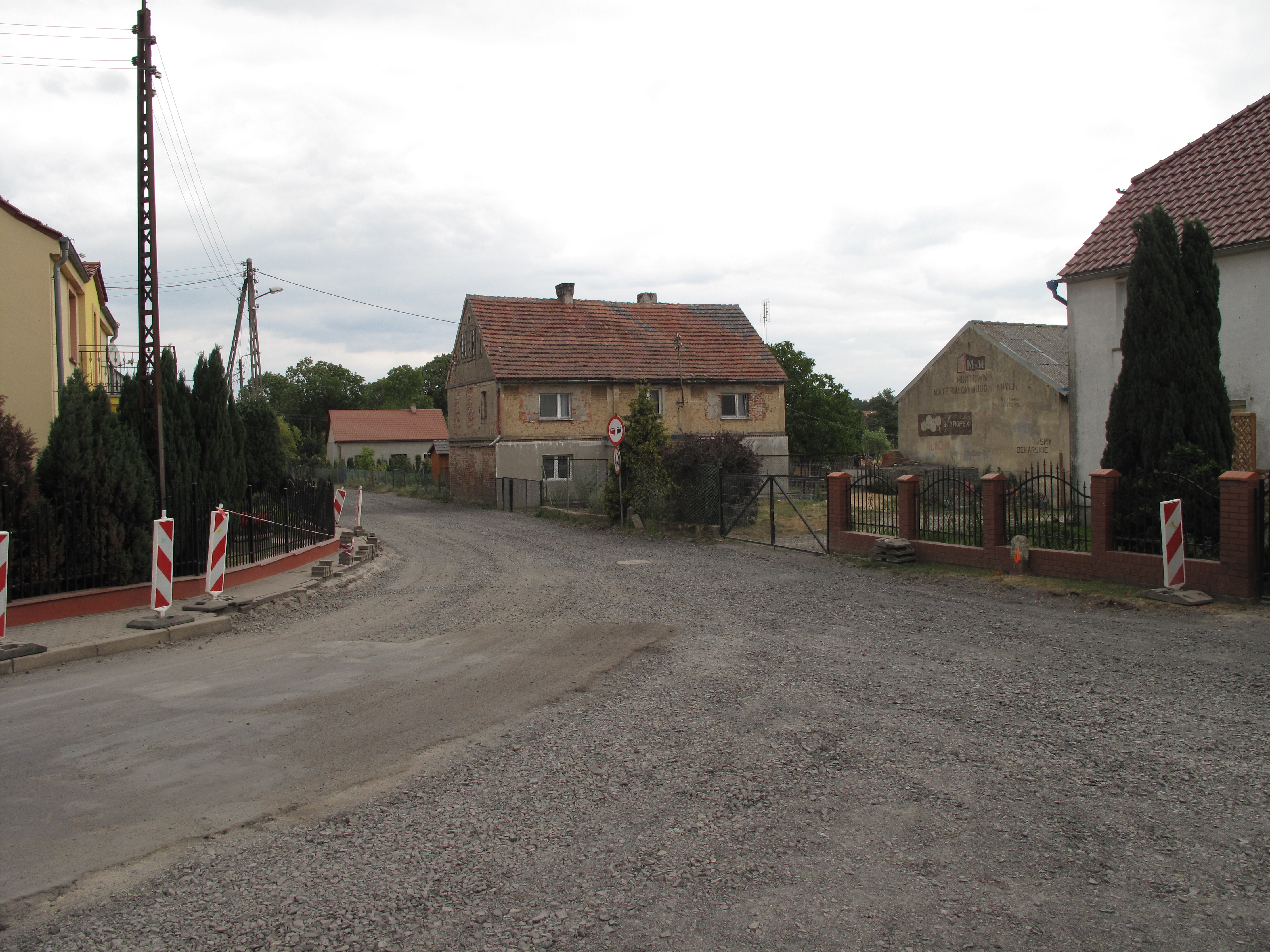 Dłużyna Dolna. Polska